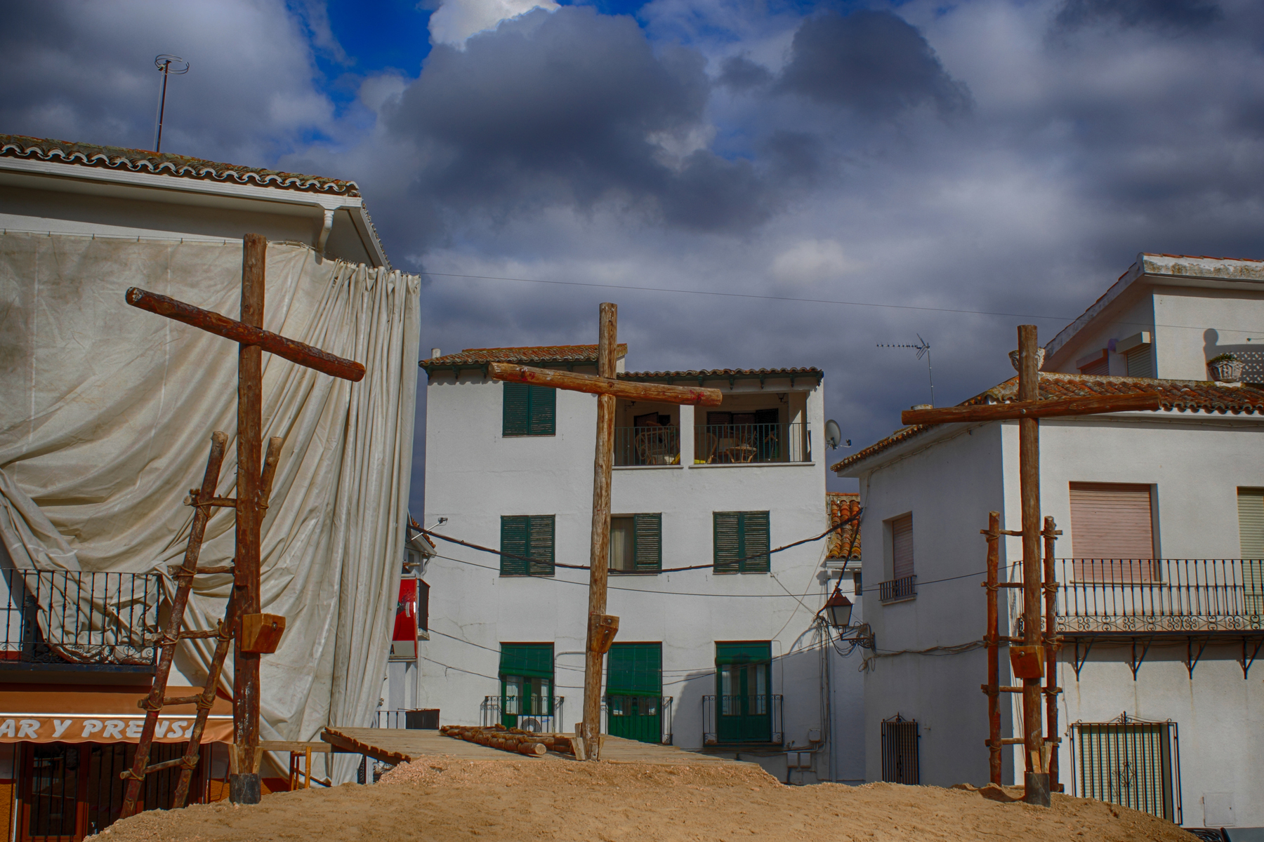 La Representación de la Pasión de Cristo el día del Viernes Santo, se viene realizando desde el año 1988. En ella participan y colaboran más de 200 vecinos. Plaza de España Carabaña Comunidad de Madrid España